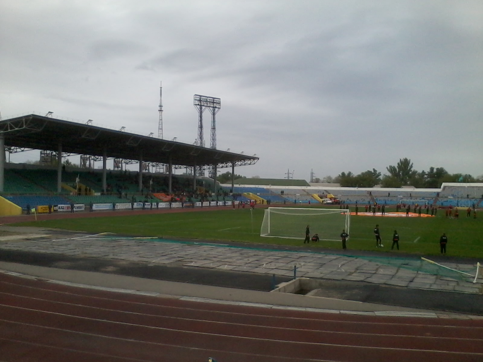 Стадион «Шахтёр» в Караганде (вид с северной трибуны)